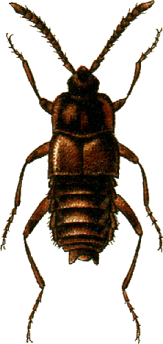 This file has been extracted from another file: Jacobs13.jpg